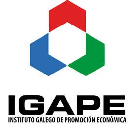 Logo del IGAPE (Instituto Gallego de Promoción Económica)